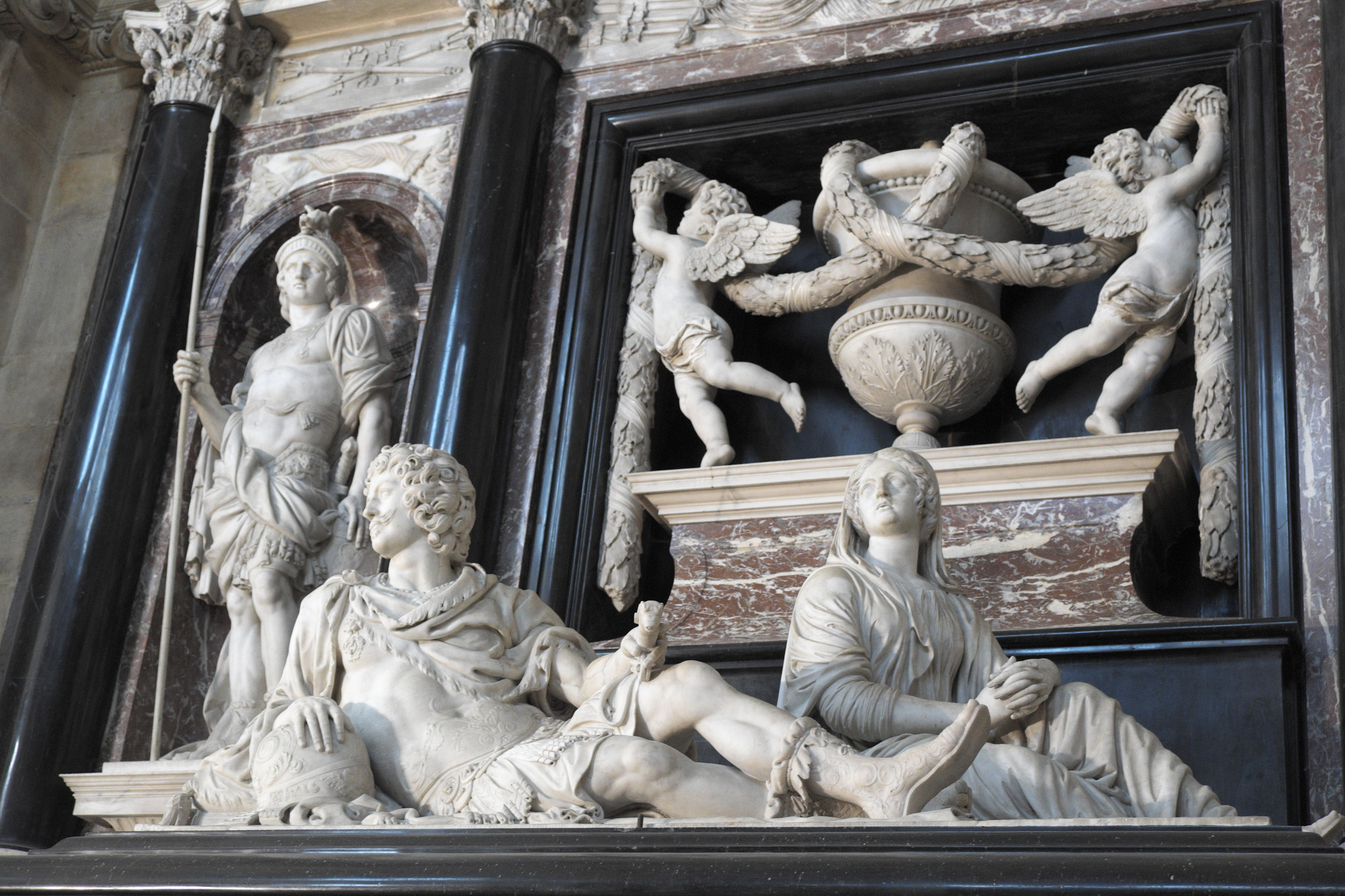 Kapelle Saint-Joseph, ehemalige Kapelle des Ordens von der Heimsuchung Mariens (Chapelle de la Visitation) in Moulins im Département Allier (Auvergne-Rhône-Alpes/Frankreich), Grabmal für Henri II. de Montmorency, 1649/52 von den Bildhauern Michel und François Anguier, Thibault Poissant und Thomas Regnaudin geschaffen